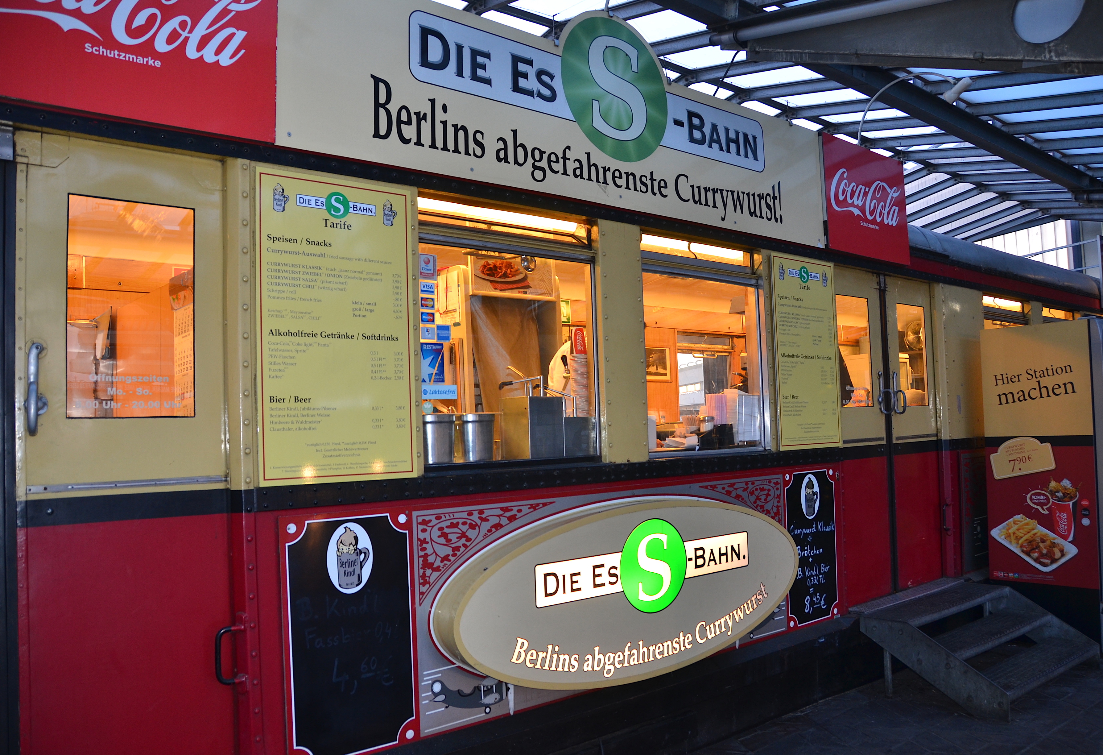 Berliner Currywurst, S-Bahn am Flughafen Berlin-Tegel